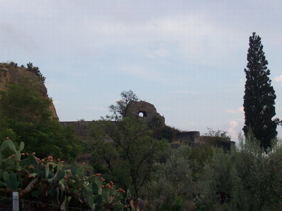 Autore e Fonte: Riccardo Spoto; Descrizione: Santa Maria di Licodia, Petra Pirciata; Licenza d'uso